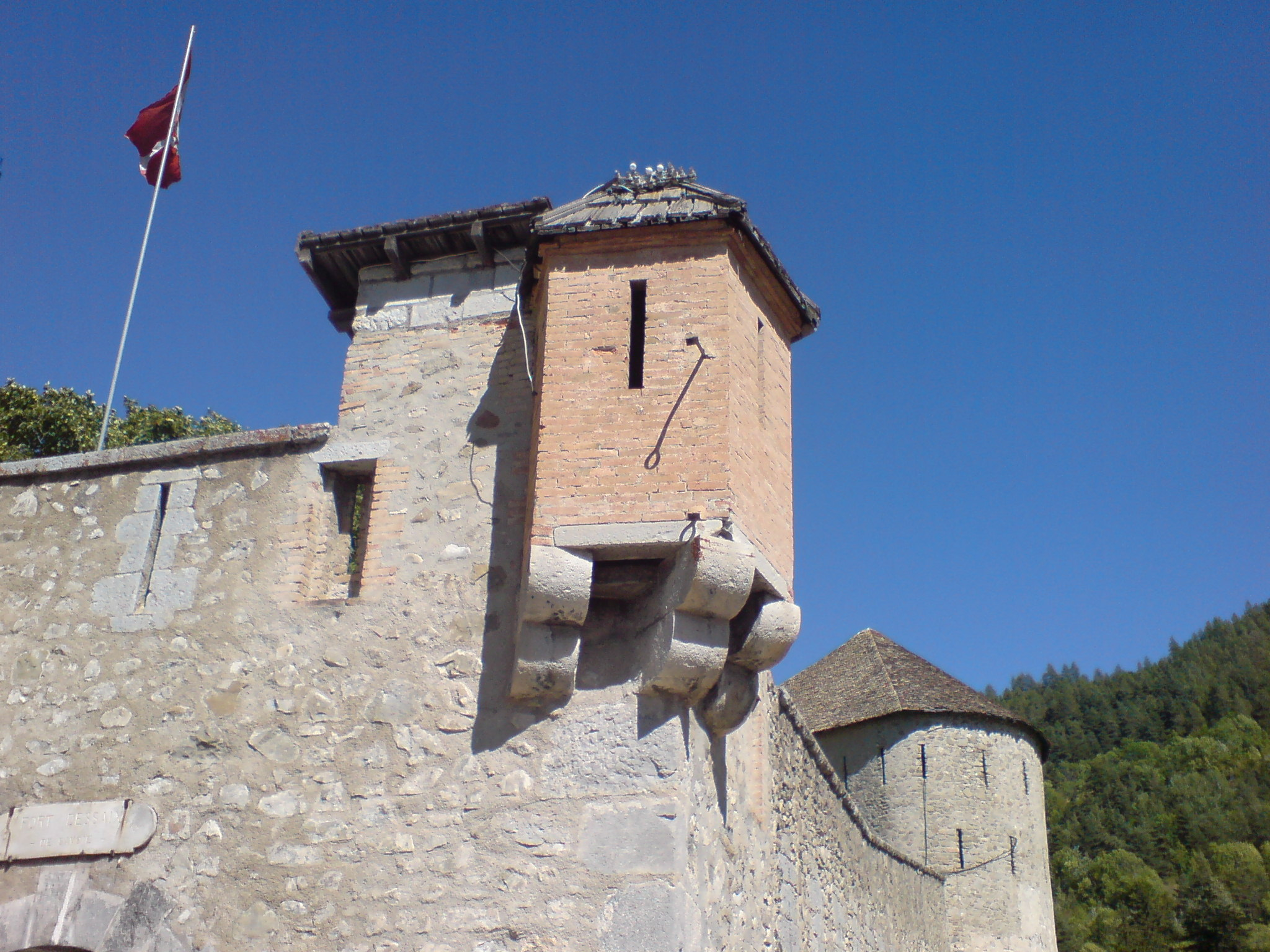 Scharwachturm auf Konsolensteinen am Fort de Savoie in Colmars